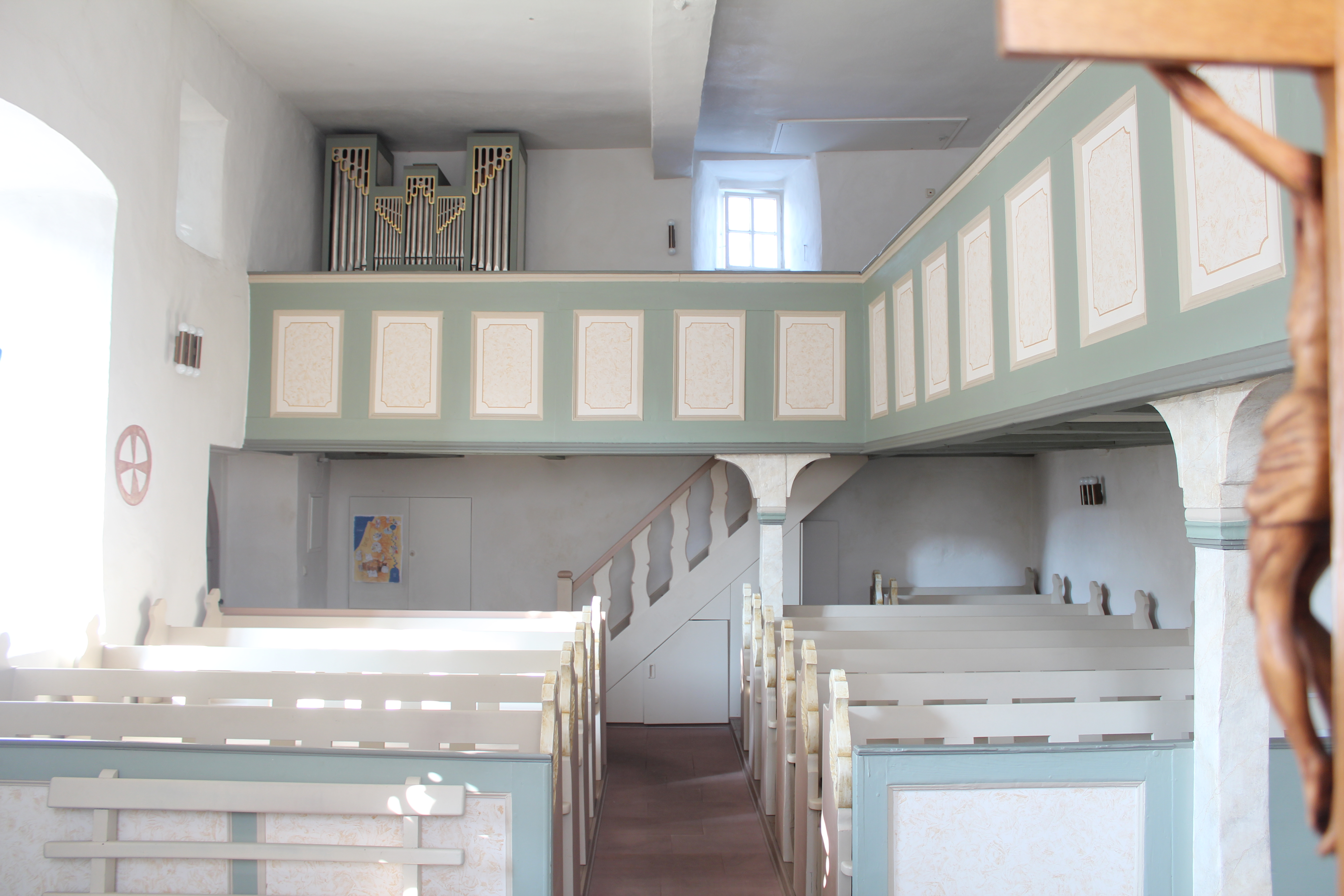 Innenraum der Evangelischen Kirche Beltershain, Stadt Grünberg, Landkreis Gießen, Hessen, Deutschland